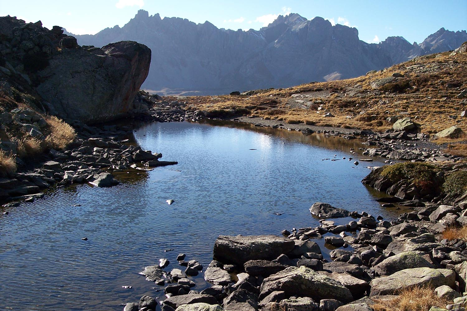 Lac dans la vallée de la Clarée, après Briançon.